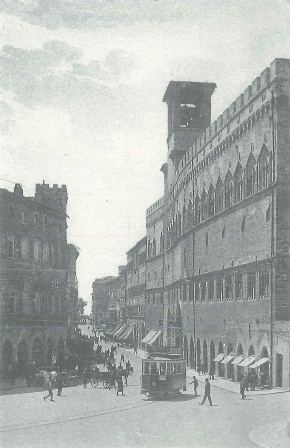 Perugia - piazza del centro con tram